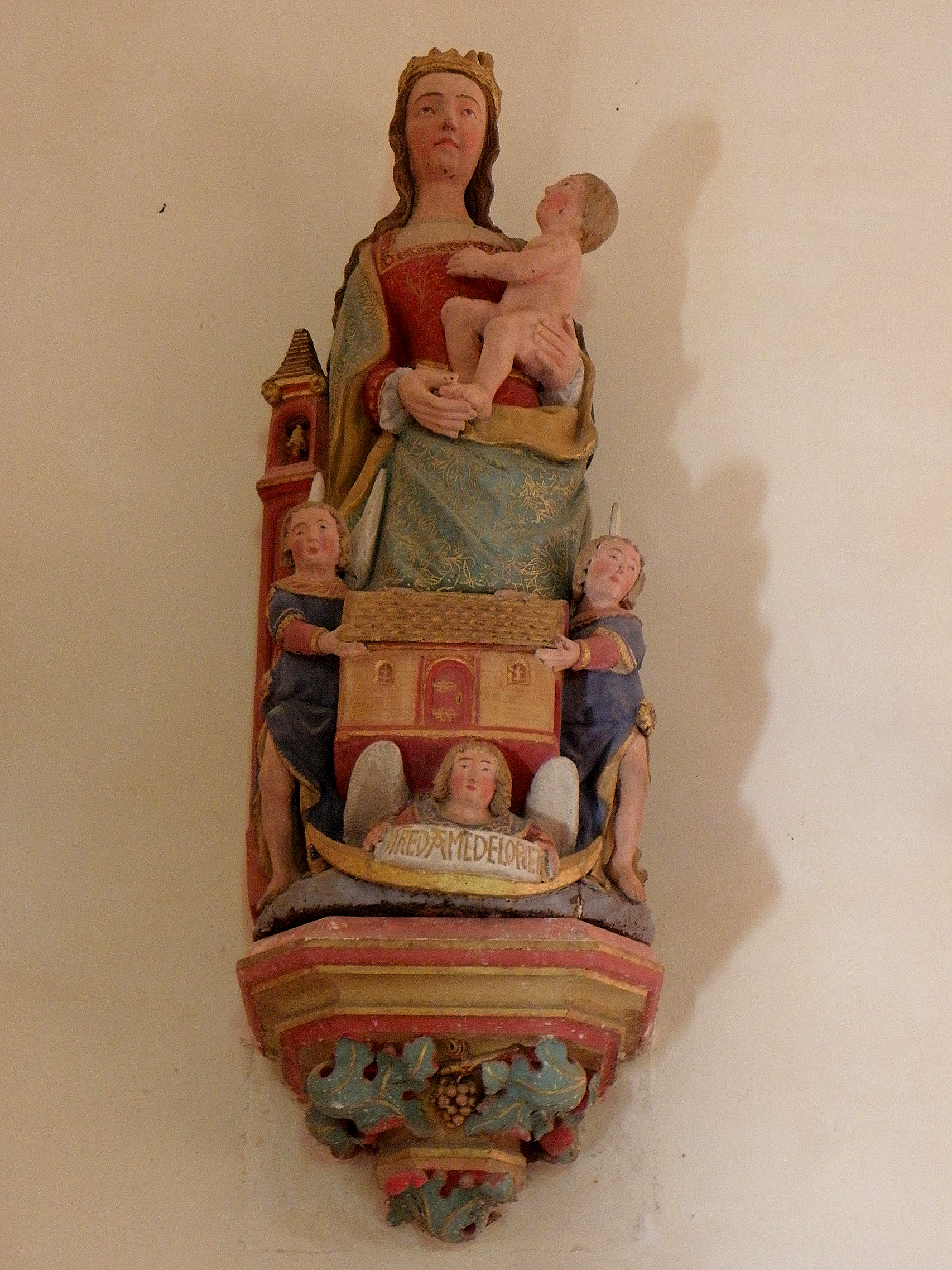 Église Saint-Sulpice de Roussines (36). Statue de Notre-Dame-de-Lorette.